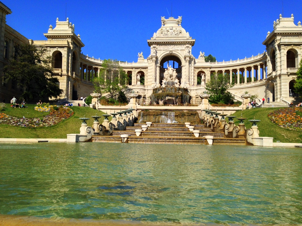 Cinq-Avenues, 13004 Marseille, France